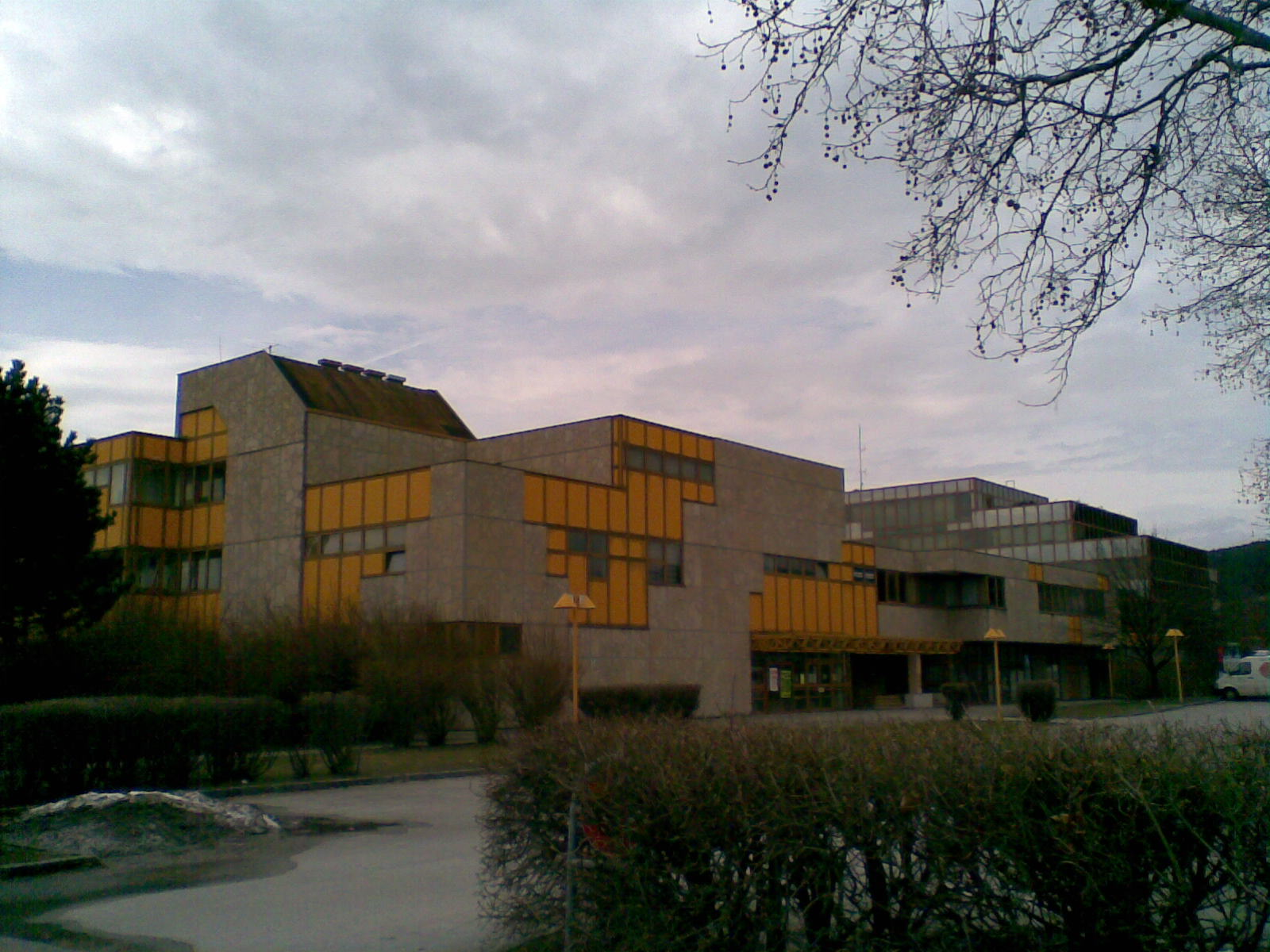 Stadtzentrum mit Gemeindeverwaltung Hans-Czettel-Platz